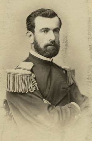 Diego Dublé Almeyda. Militar y colonizador; Don Diego Dublé Almeyda (1841 - 1922), fue también gobernador de Magallanes y durante la guerra del Pacífico, participó en las campañas terrestres de Tacna y Lima. - See more at